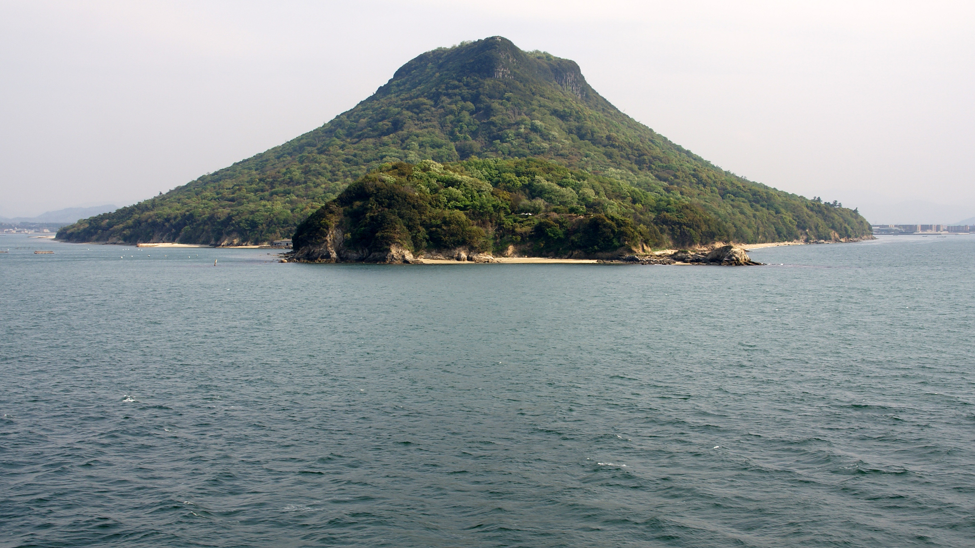 Yashima in Takamatsu, Kagawa prefecture, Japan